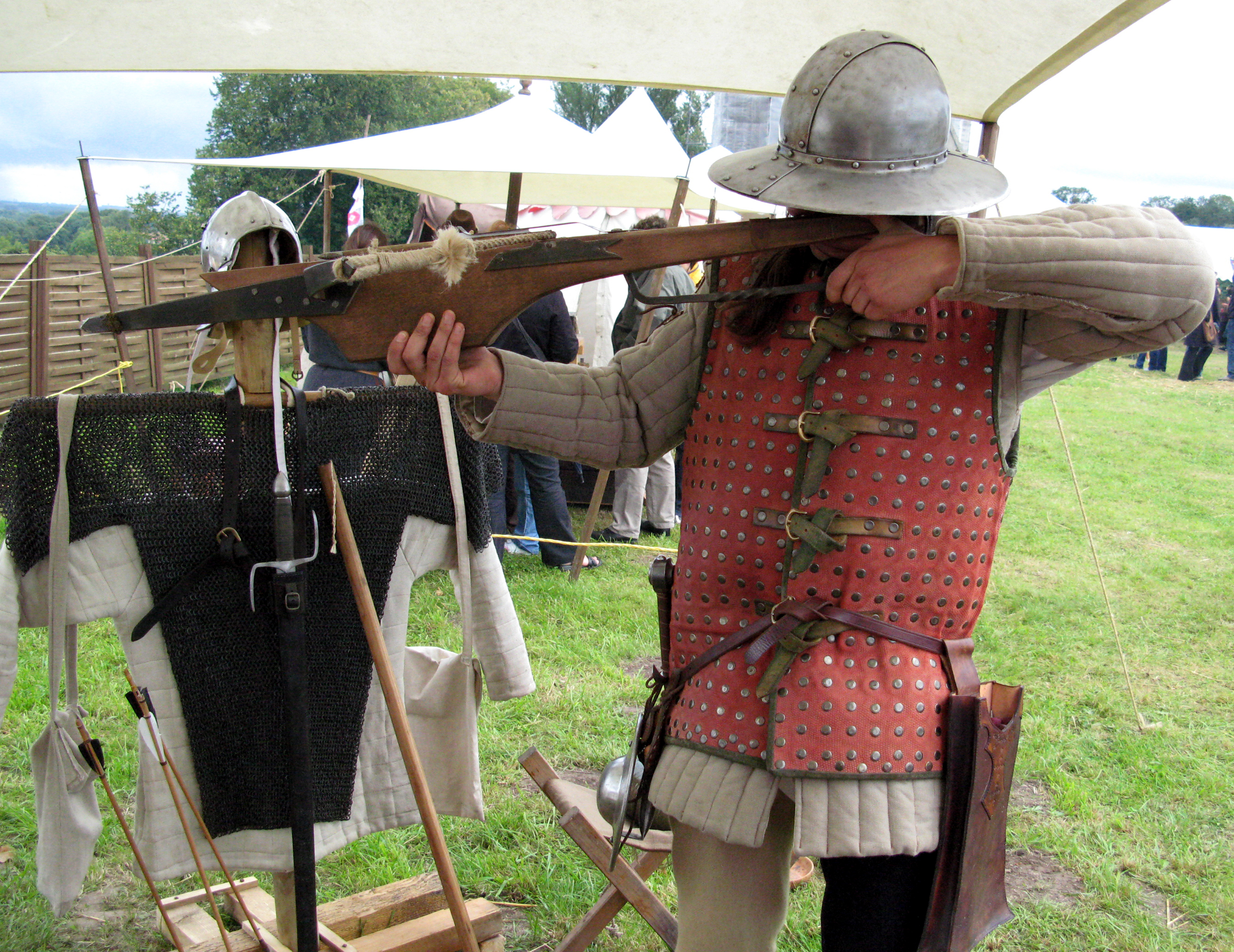 Picquigny (Somme, France) - Tir à l'arbalète, lors de la 3ème fête médiéviale en 2008. . . .